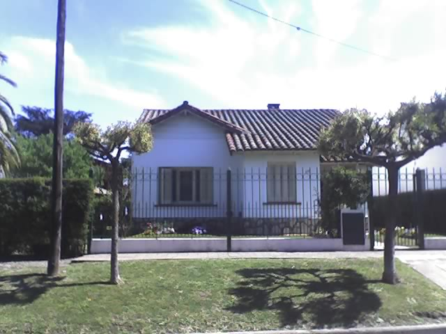 Chalet californiano, tipo de vivienda típica del primer peronismo en Argentina.